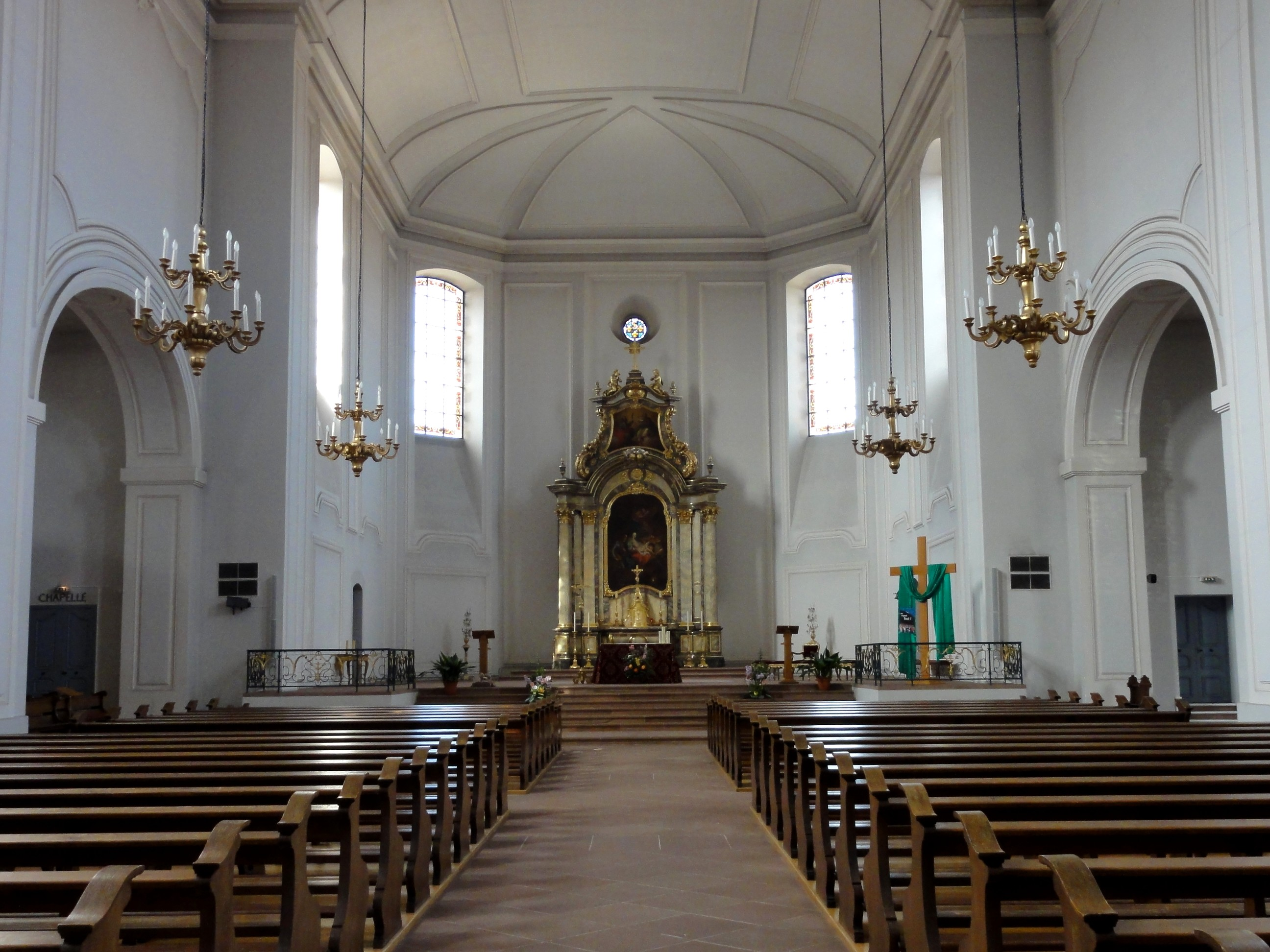 Alsace, Haut-Rhin, Église Saint-Louis de Neuf-Brisach (PA00085557, IA68005199).